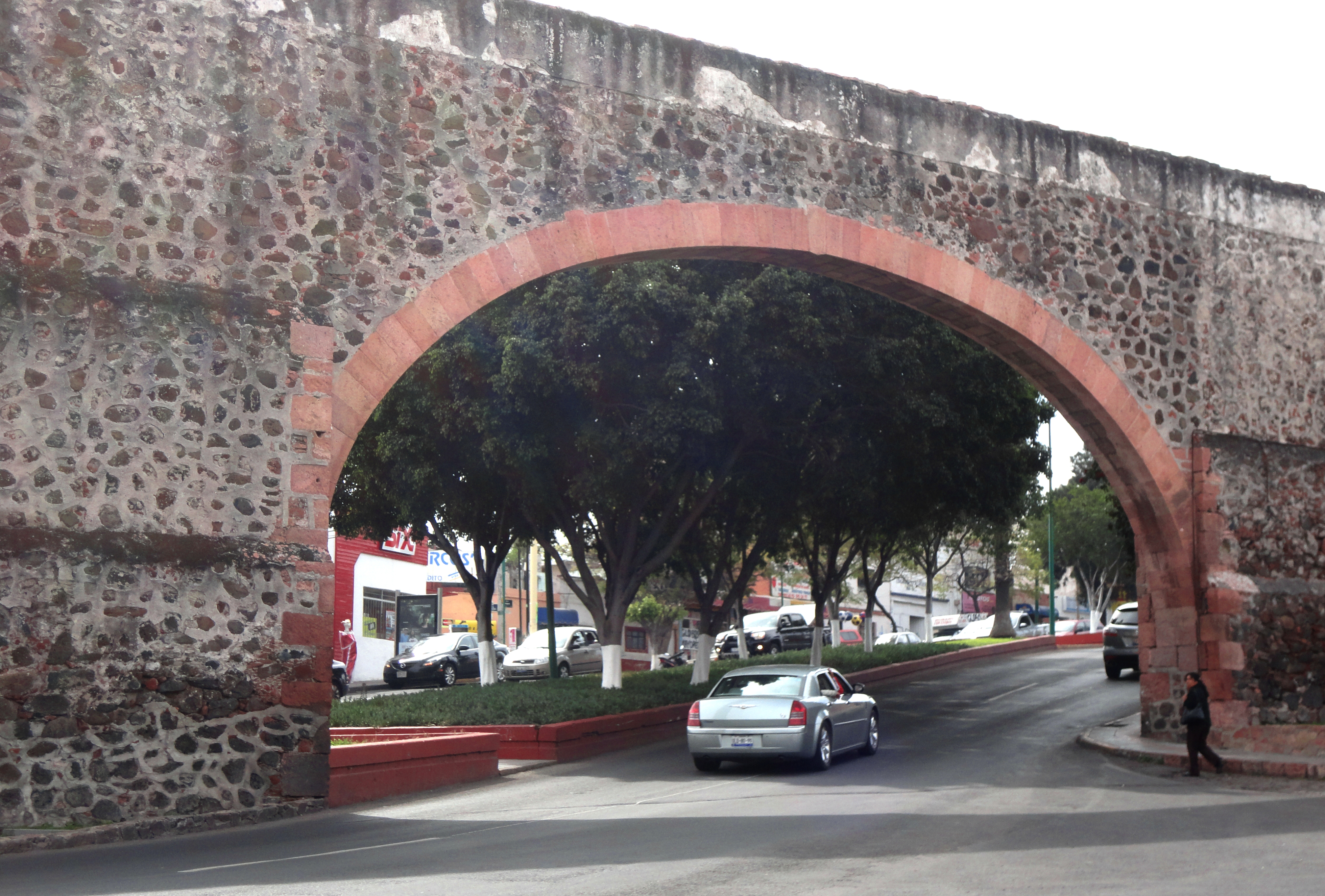 Acueducto o Los Arcos en la ciudad de Santiago de Querétaro, Qro, México.